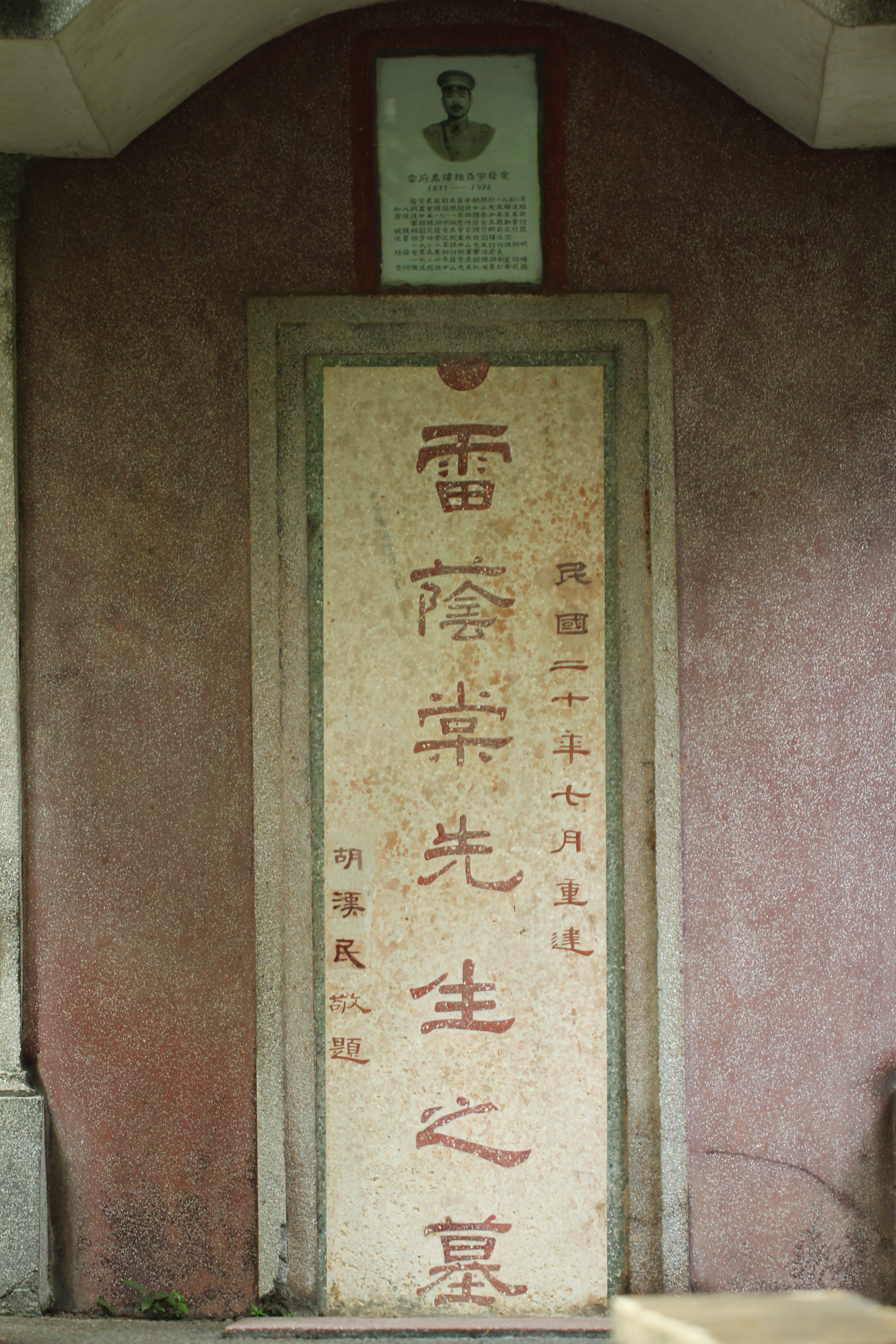 中華民國二十年七月重建於黃花崗，胡漢民題字。